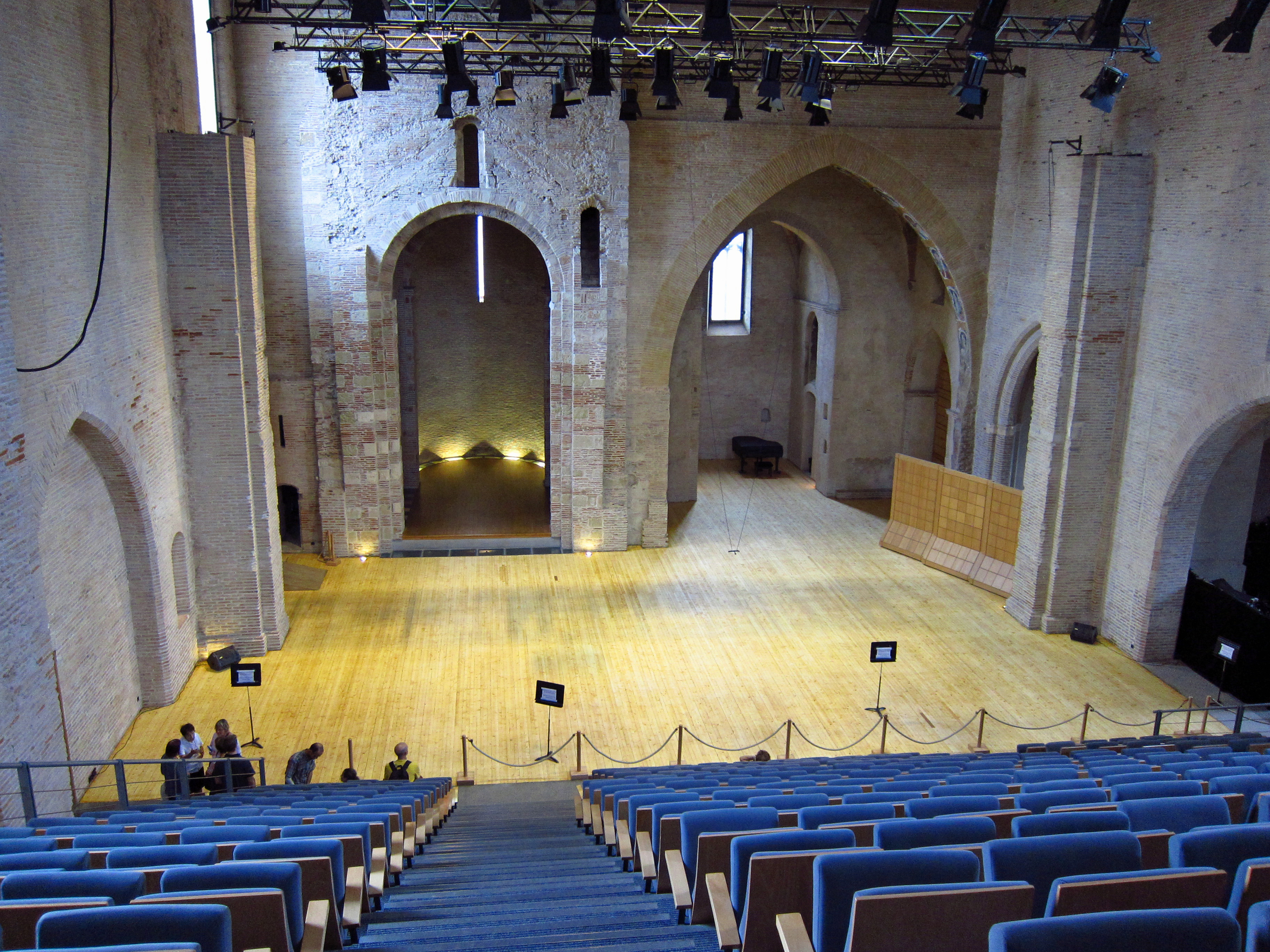 Toulouse (Haute-Garonne, France) : L'auditorium de Saint-Pierre-des-Cuisines.